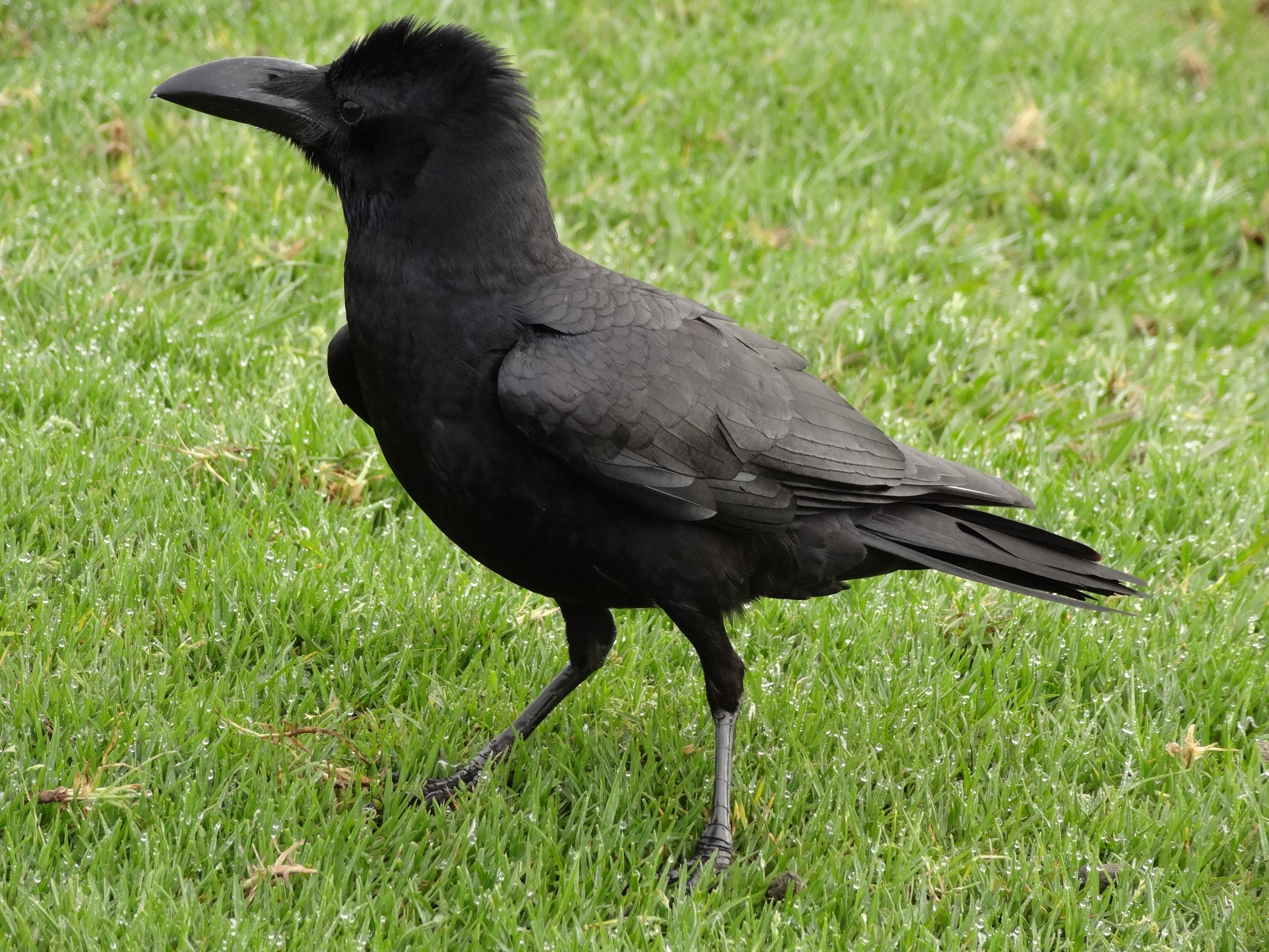 Corvus in Horton Plains National Park